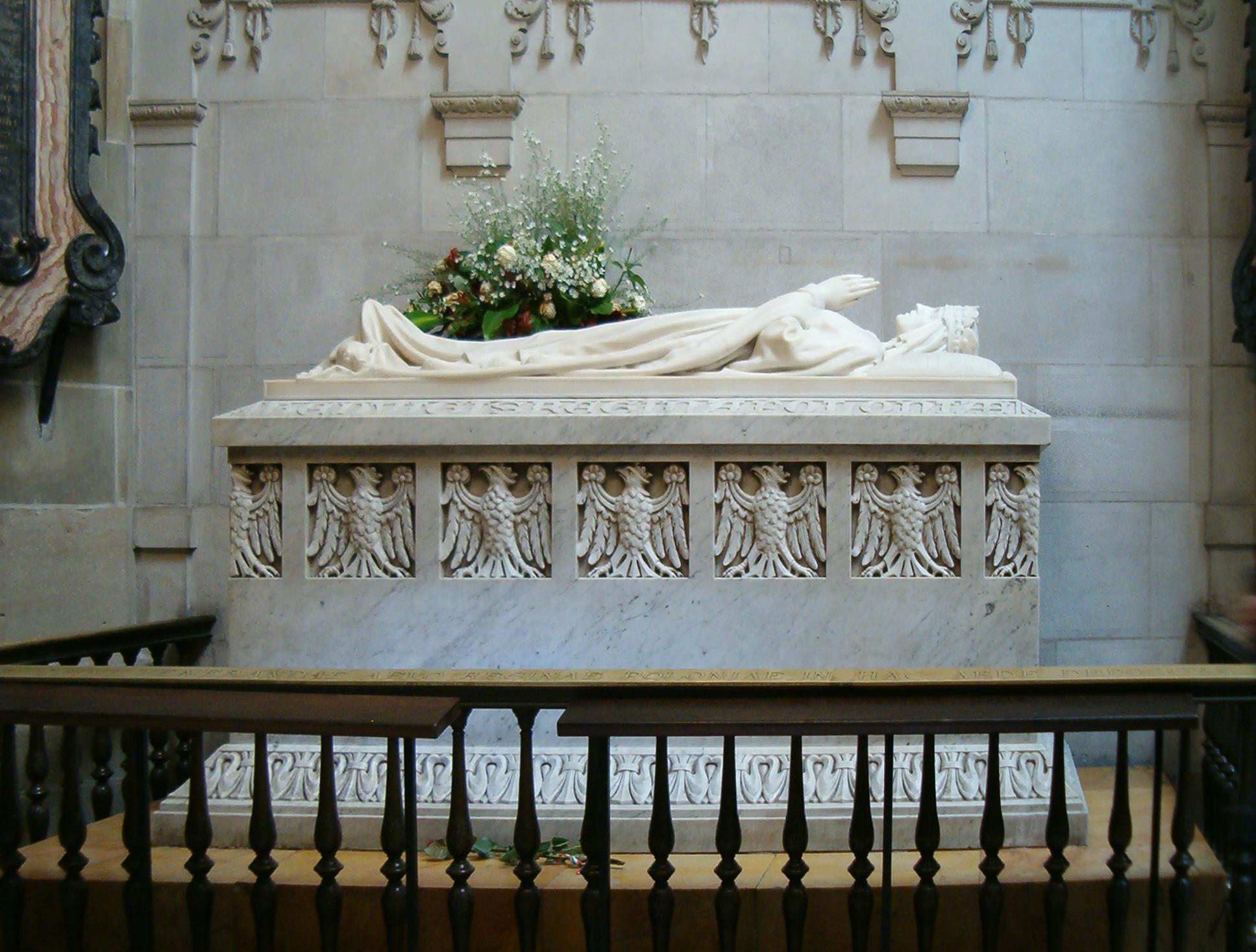 Nagrobek Jadwigi Andegaweńskiej w Królewskiej Katedrze na Wawelu